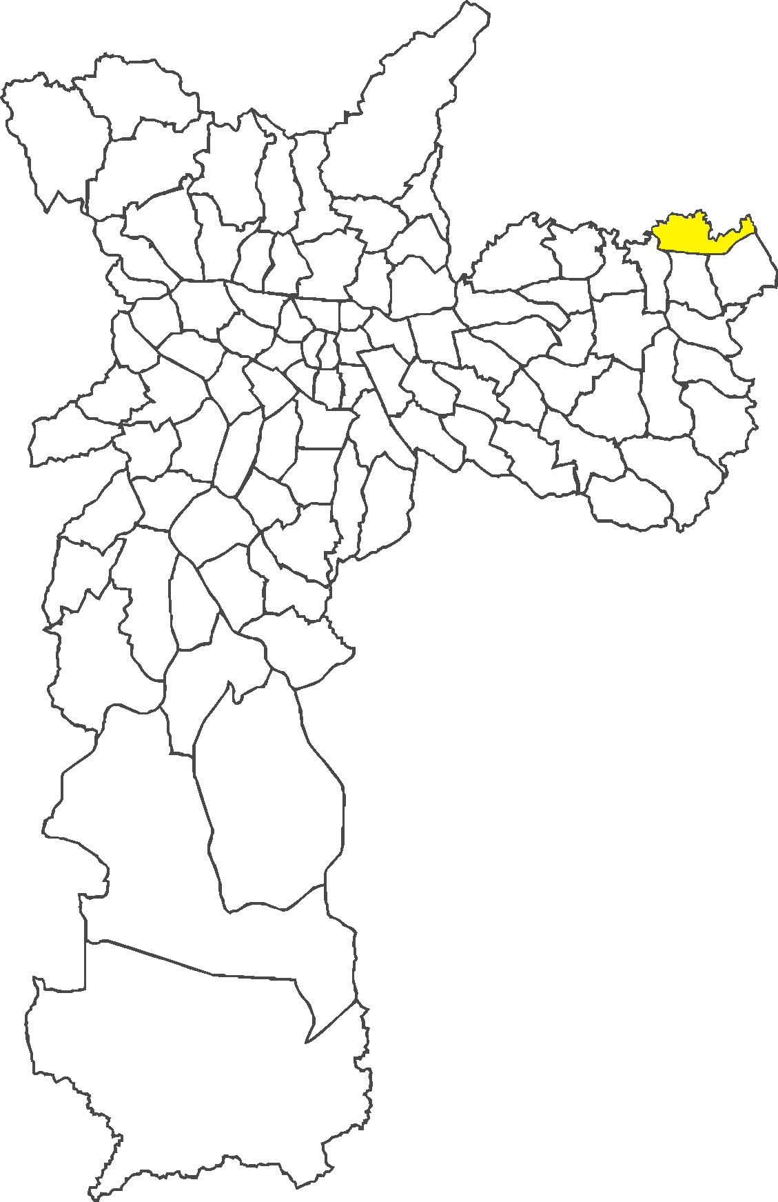 Localização do distrito do Jardim Helena no município de São Paulo.